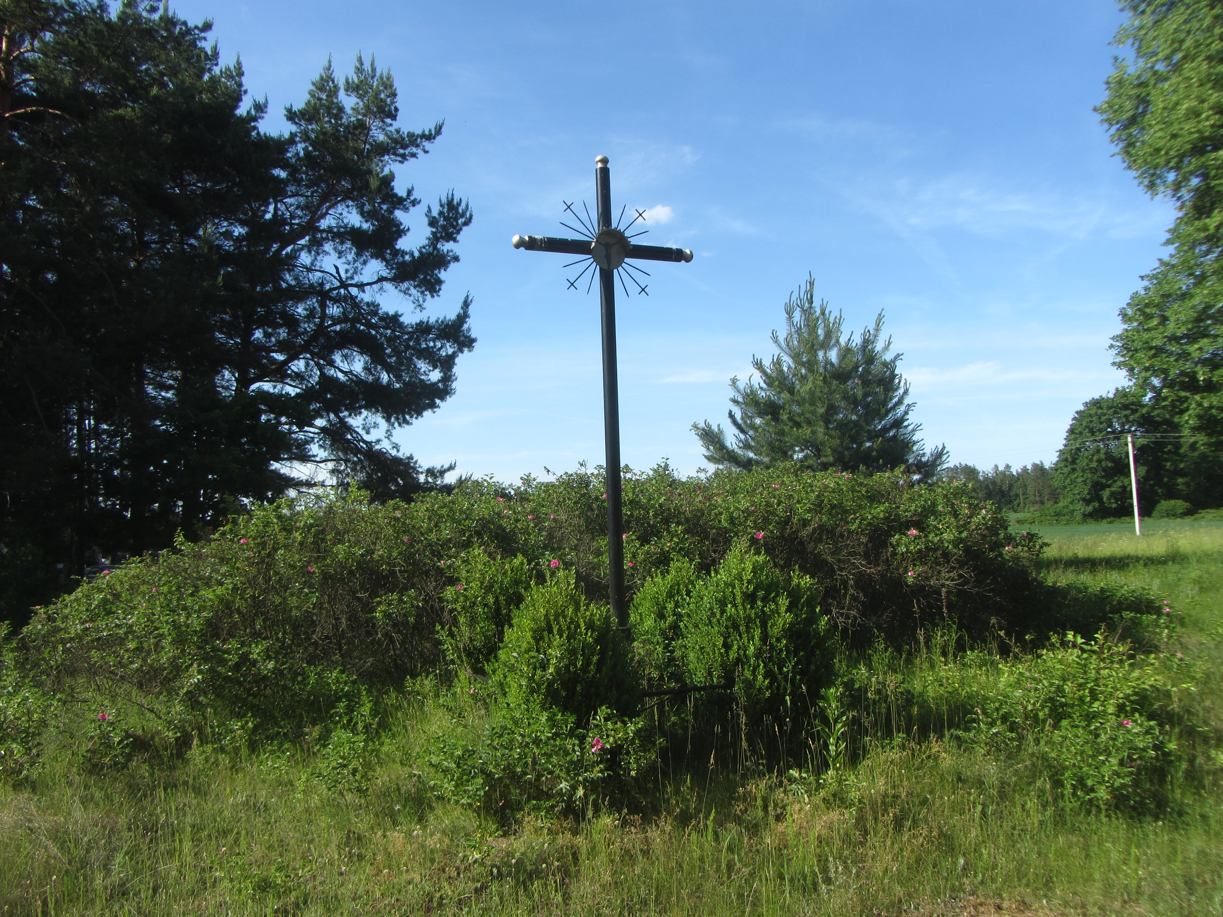 Jiezno sen., Lithuania